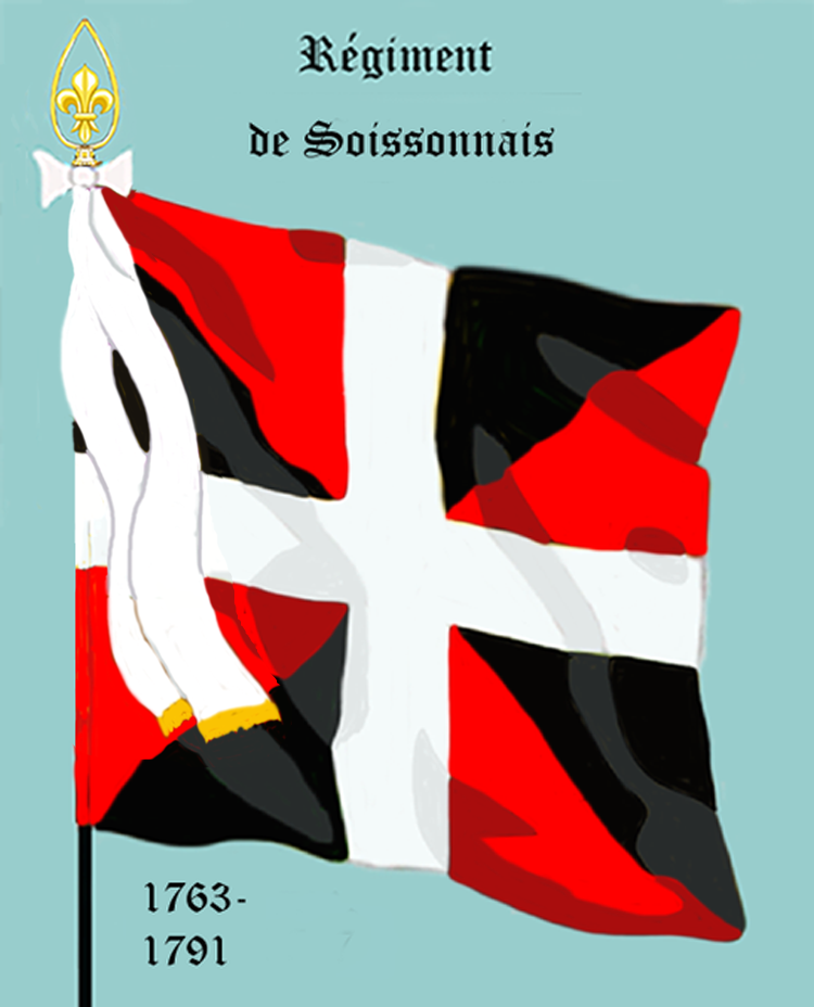 Ordonnanzfahne eines königlich französischen Infanterie-Regiments. - Entnommen und überarbeitet aus: „LES UNIFORMES ET LES DRAPEAUX DE L'ARMÉE DU ROI“ Marseille 1899. (Drapeau d'ordonnance d' un régiment française d'infanterie royale.)